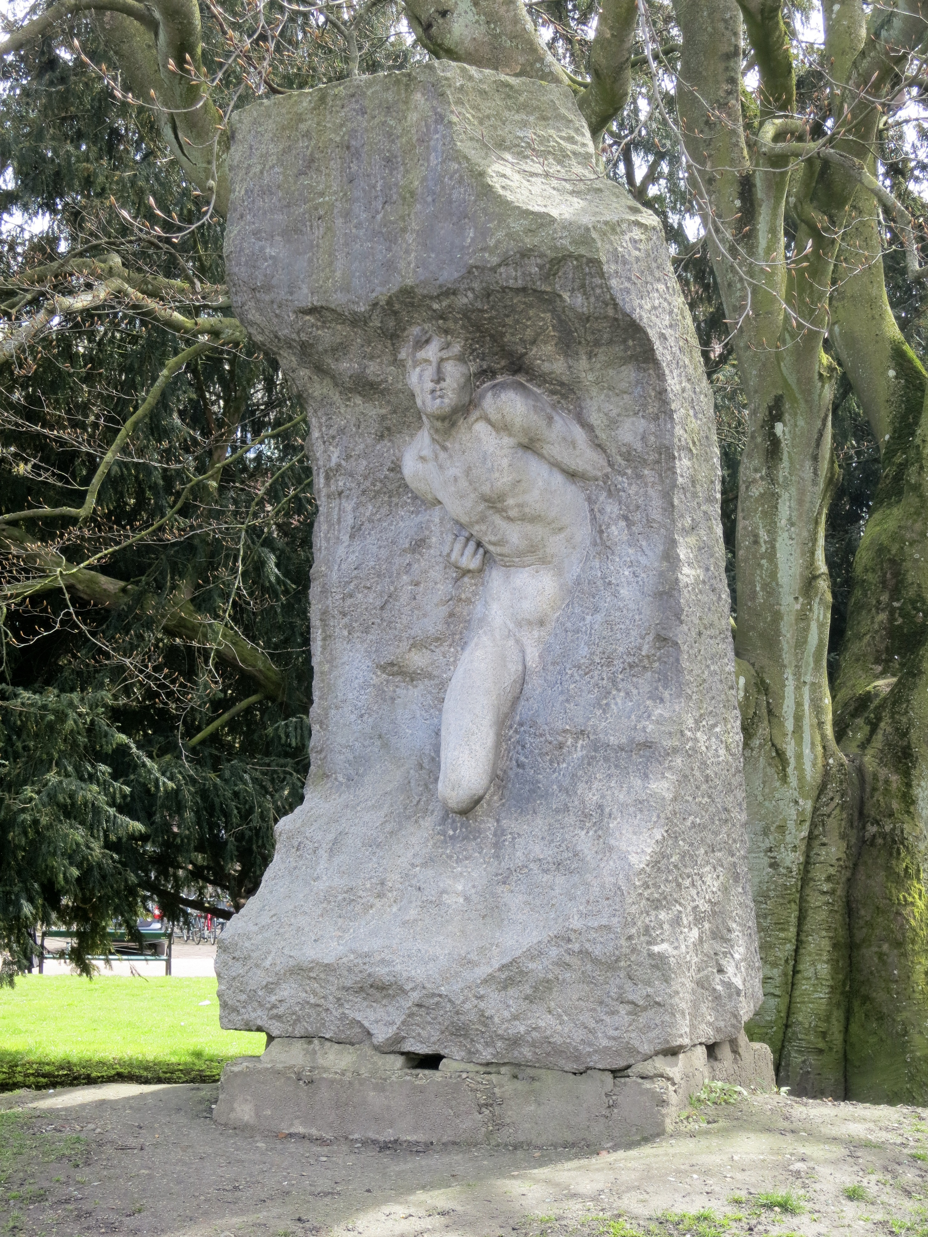 Mannen som bryter sig ur klippan, staty av Axel Ebbe